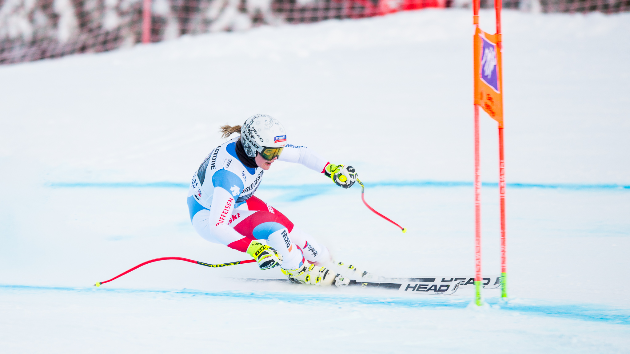 64. Kandahar Rennen,Audi FIS Ski Weltcup Garmisch-Partenkirchen,Corinne Suter,Damen Abfahrt,Kandahar,Ladies Downhill